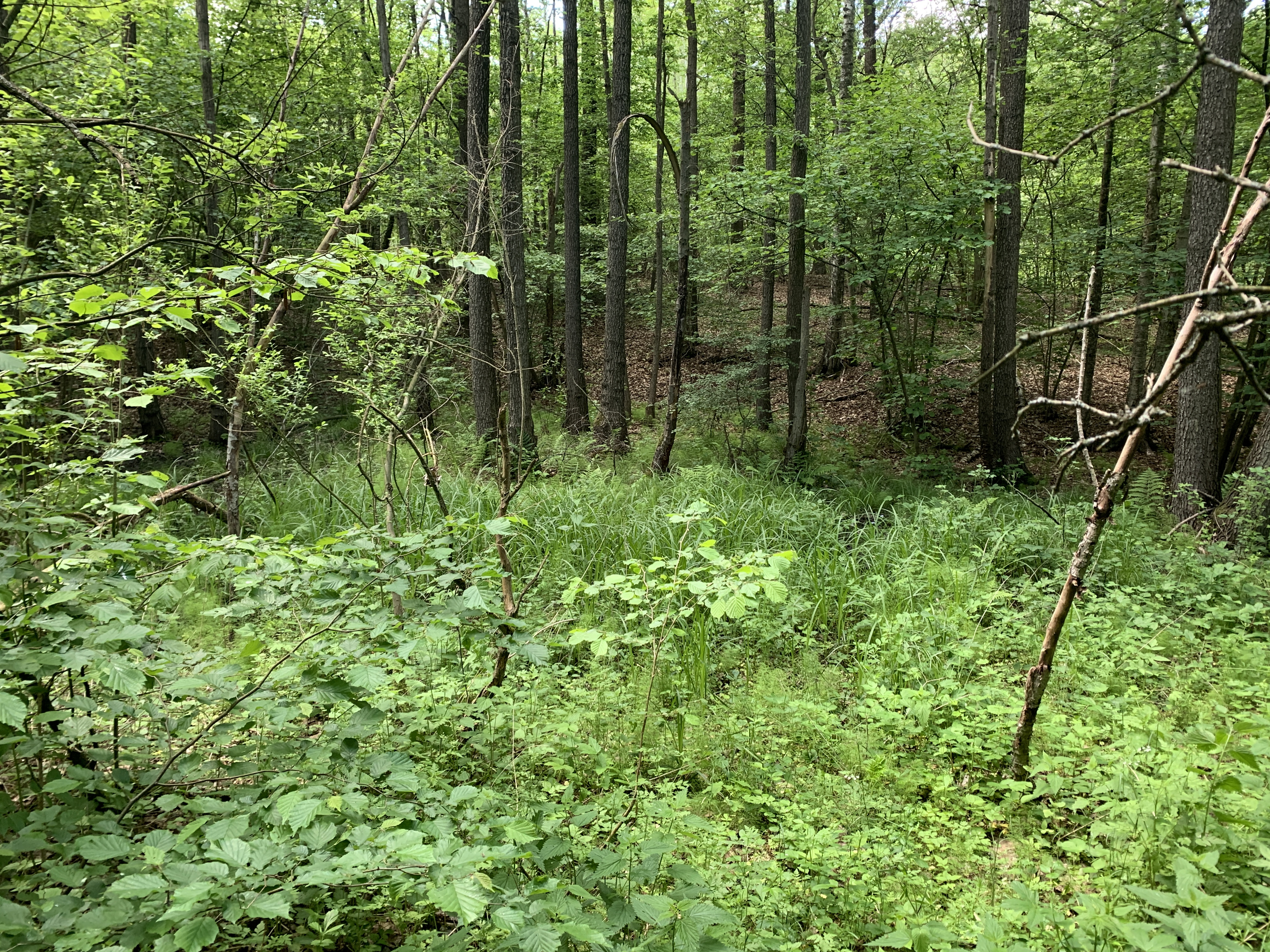 Im Naturschutzgebiet Brandrübeler Moor Landkreis Altenburger Land in Thüringen.